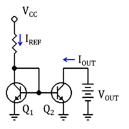 Simple bipolar transistor mirror